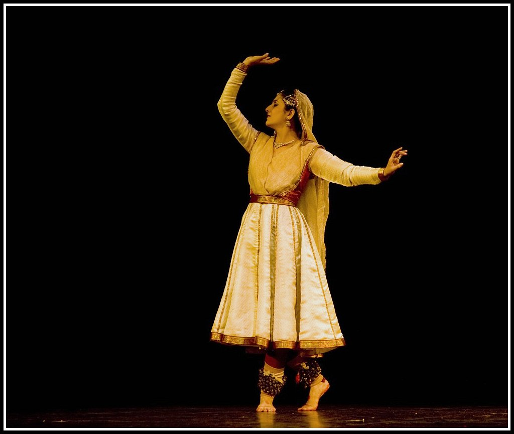 Kathak by Radhika Singh